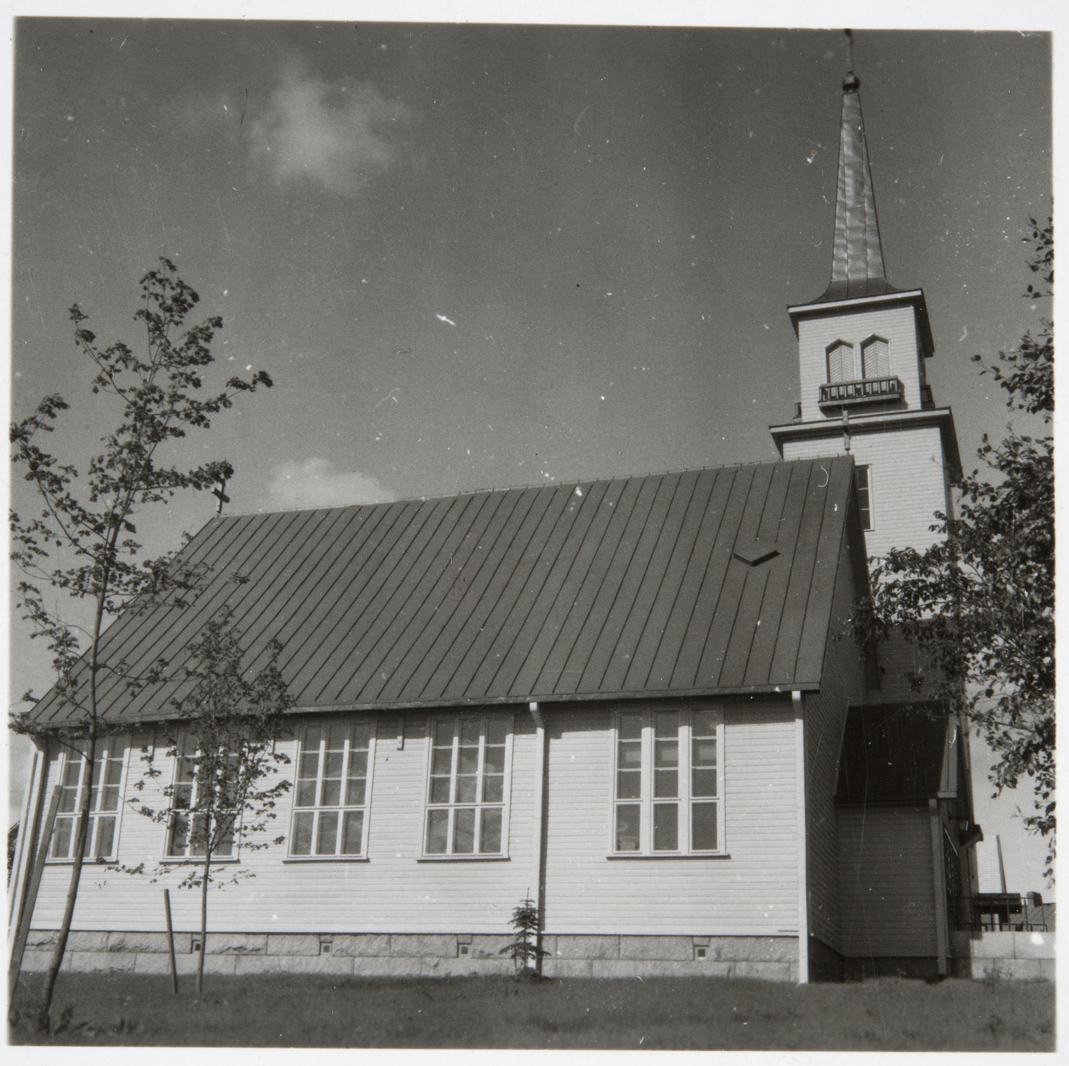 Pispalan kirkko Tampereella 1950-luvulla. Kirkko paloi vuonna 1968.